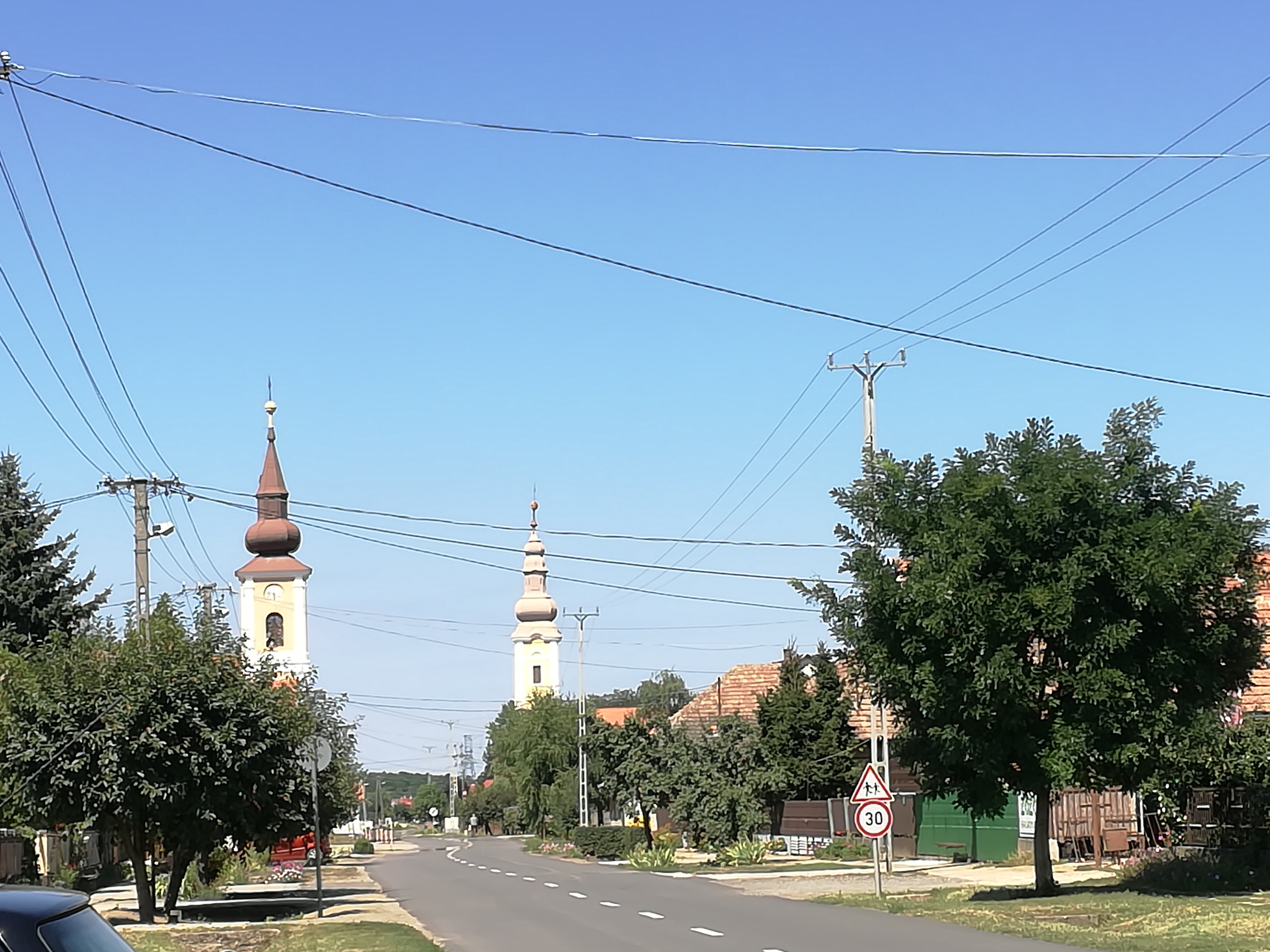 nyirkaraszi templomok